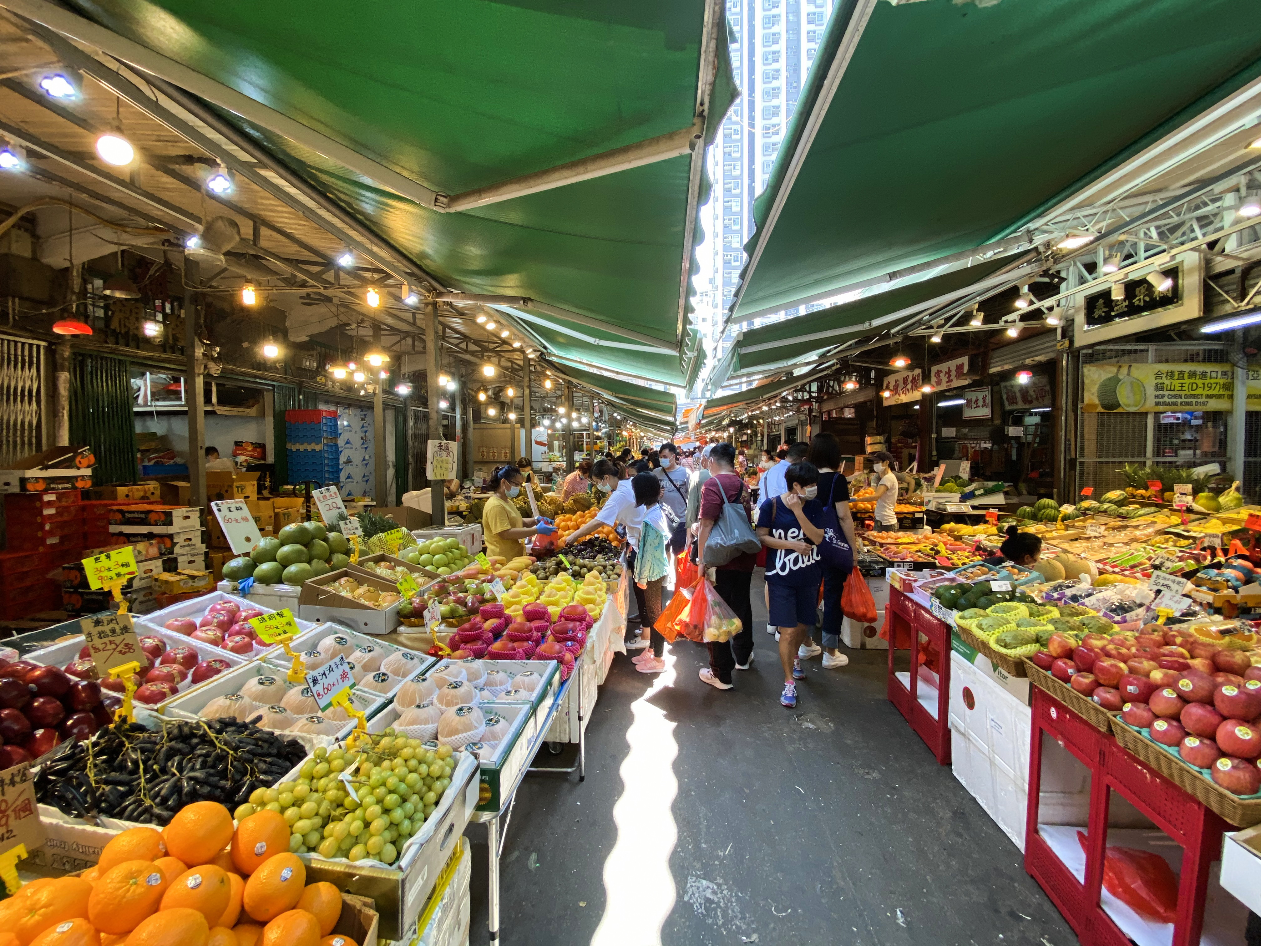 Shek Lung Street in Yau Ma Tei Fruit Market